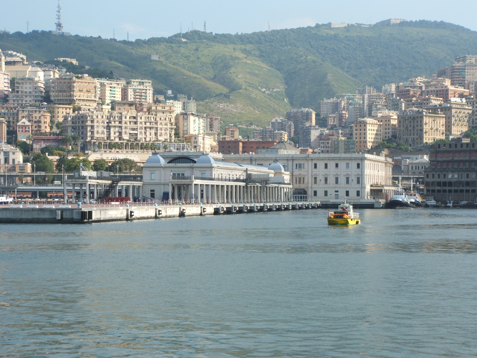 Immagine dal porto antico di Genova, Italia.